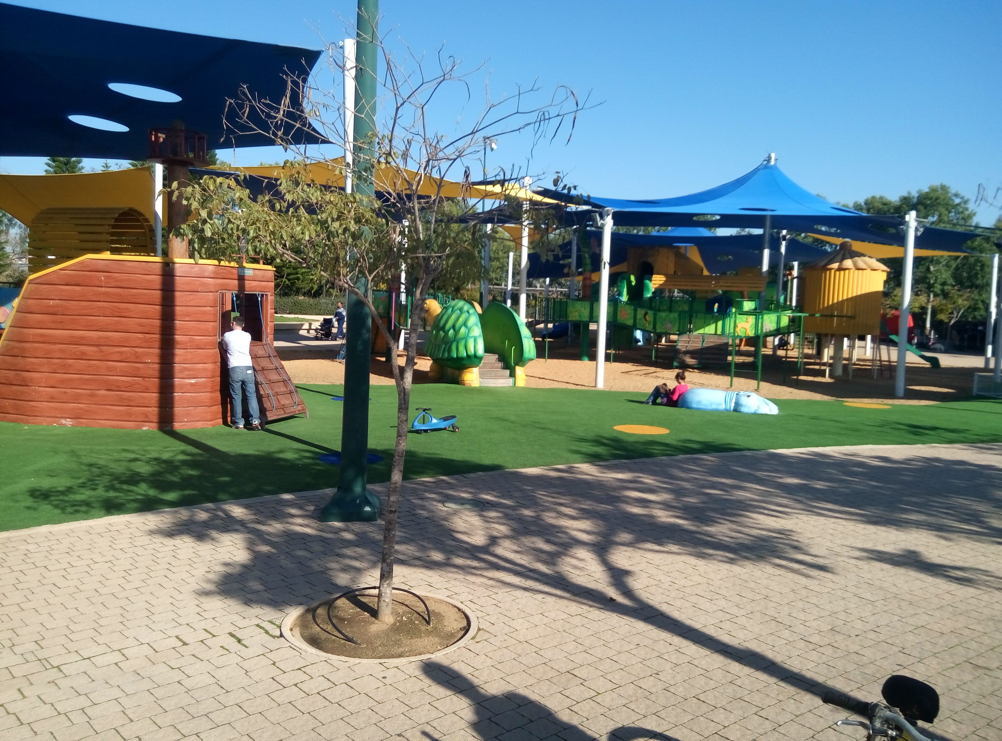 גן פארק כפר סבא